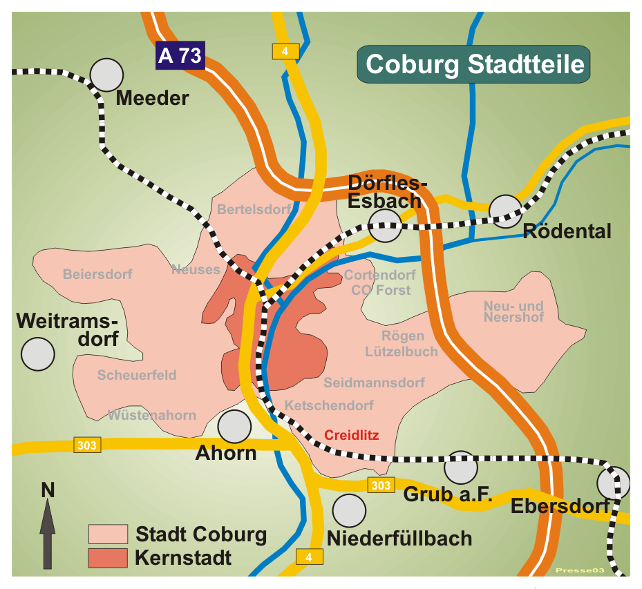 Karte von Coburg, Stadtteil Creidlitz